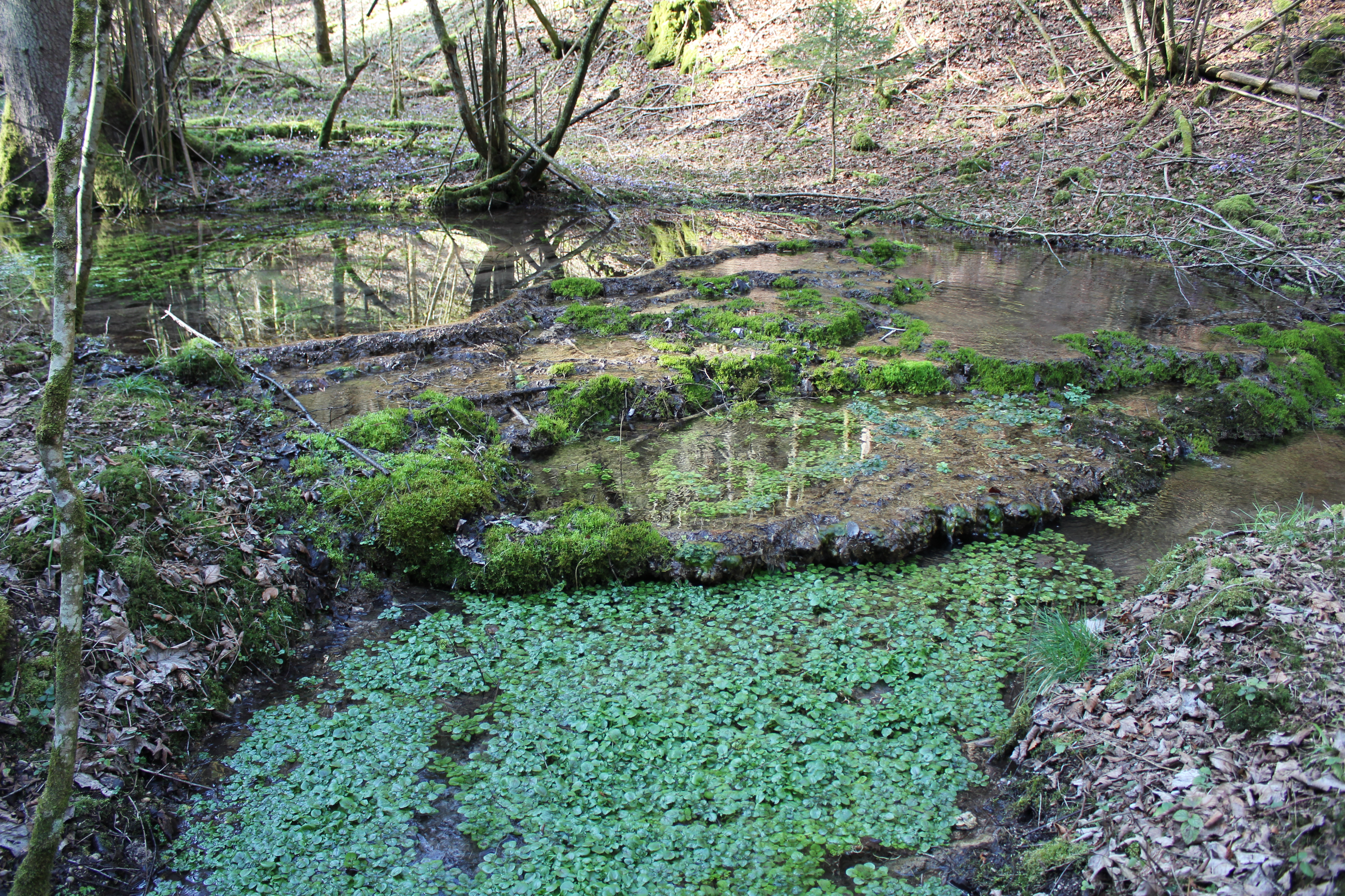 Bach gespeist aus natürlichen Hangquellen mit Sinterterrassen im Teufelsgraben